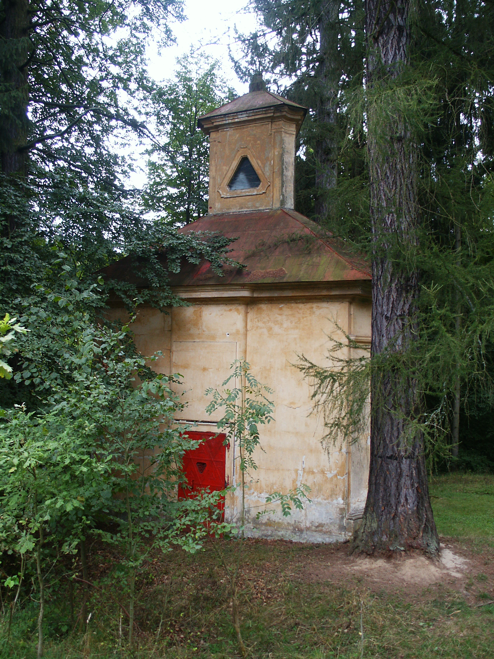 Kaple Nejsvětější Trojice, Z od Ostružna při cestě ke Štidlům, Ohařice - pohled od cesty